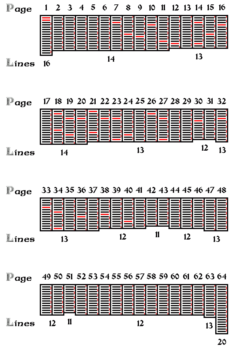 Метрика Региуса по страницам